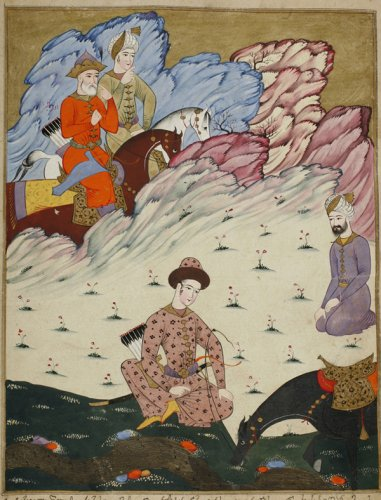 ვეფხისტყაოსნის მინიატიურა ბეგთაბეგისეული ნუსხიდან.